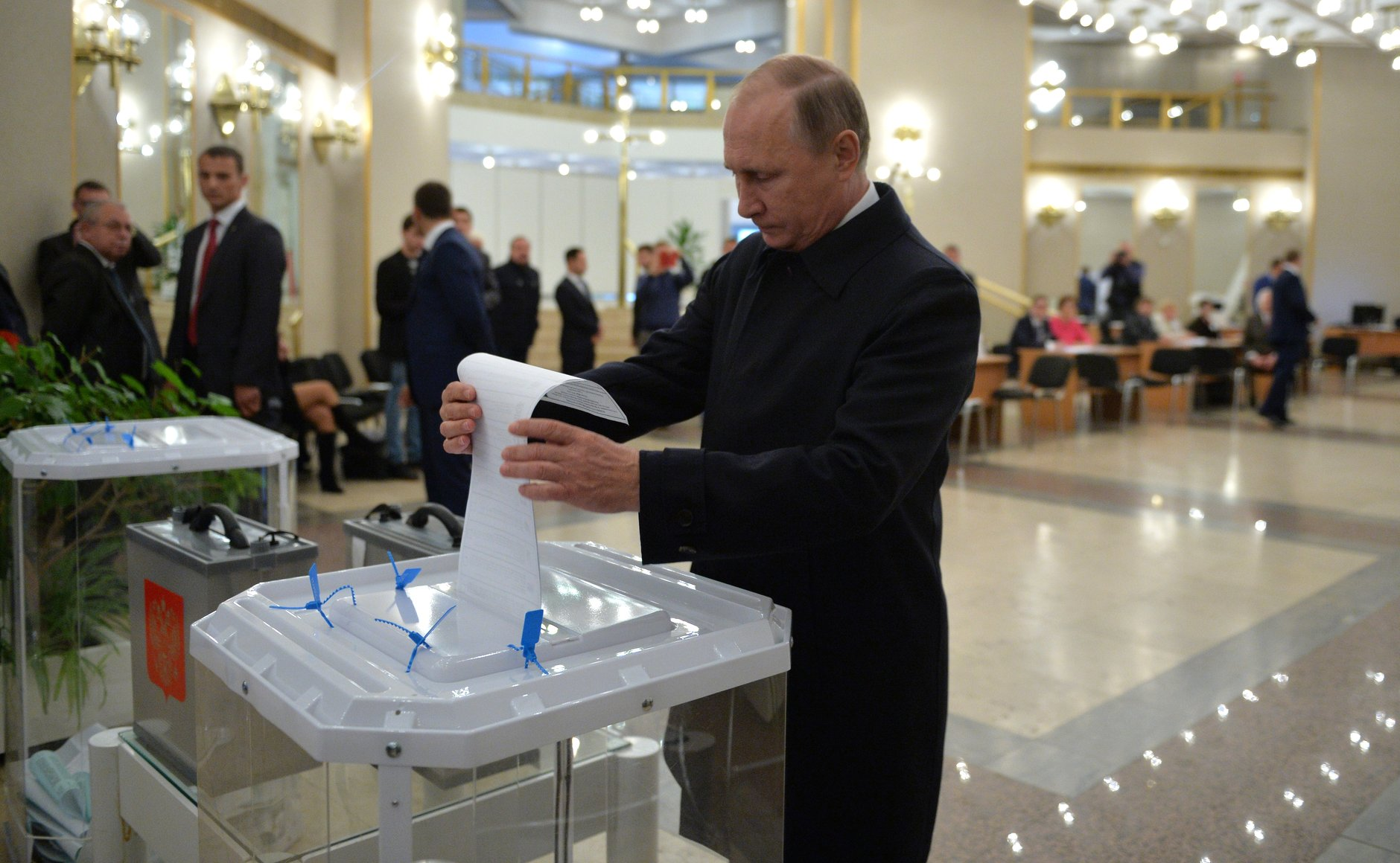 Президент России Владимир Путин на избирательном участке №2151 во время голосования на выборах депутатов Государственной Думы